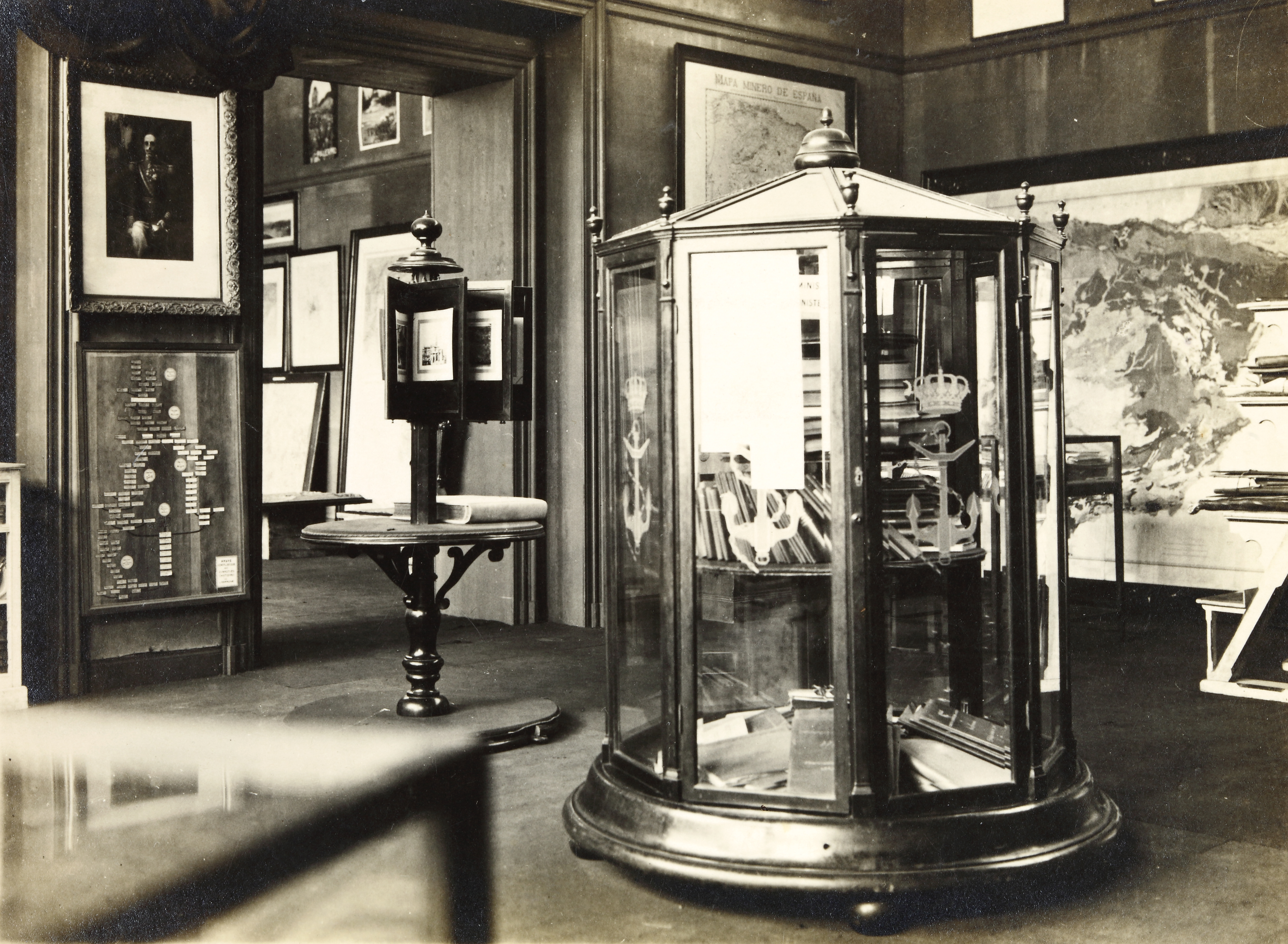 Palais Mondial. Salle d'Espagne. Nouvelle disposition. 1927